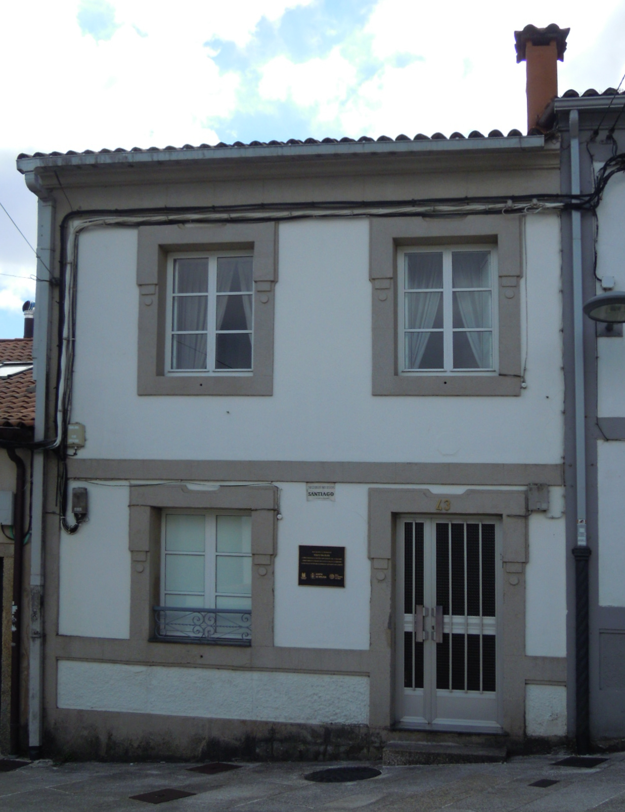 Casa natal de Roberto Vidal Bolaño en Vista Alegre (Santiago de Compostela).